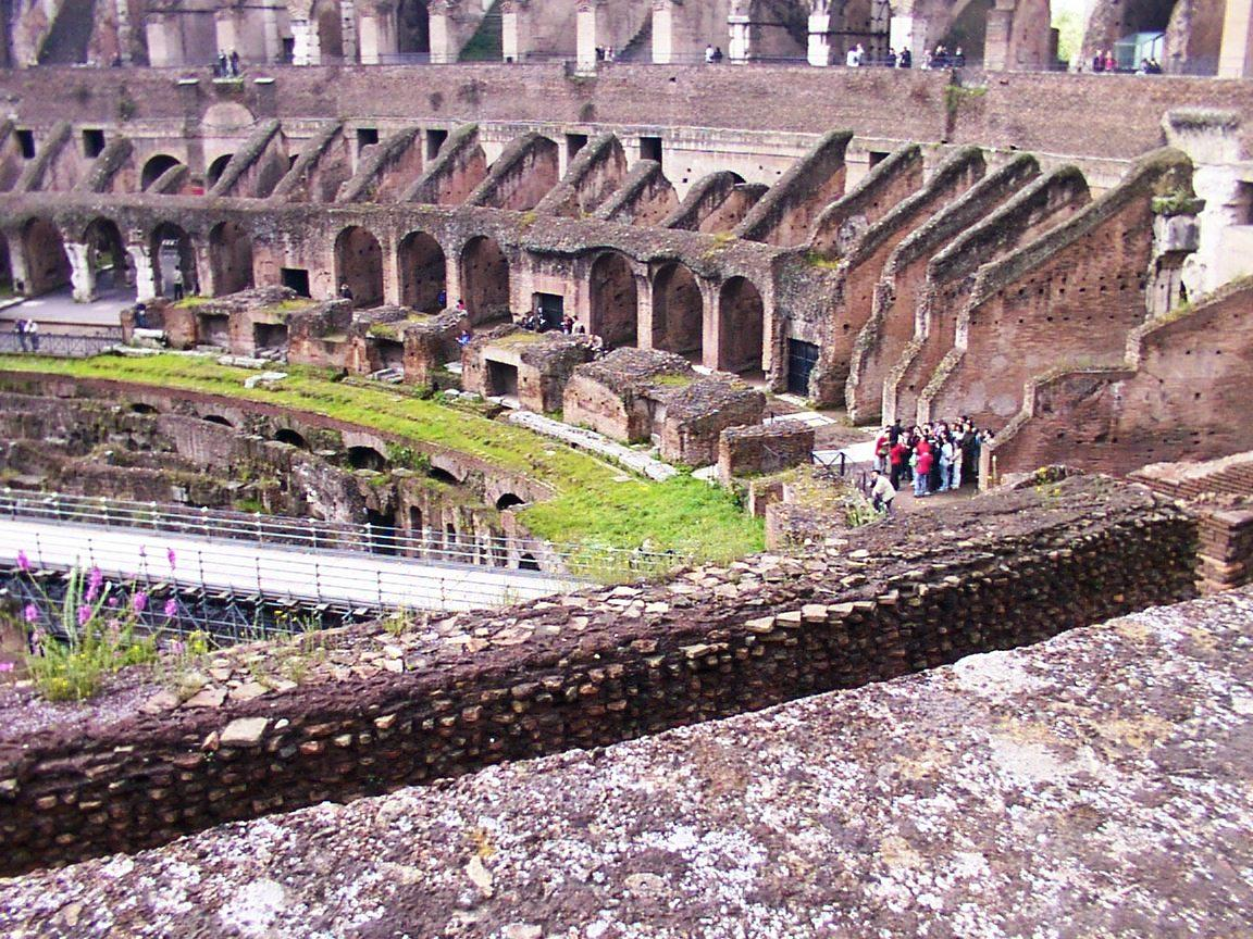 Il Colosseo a Roma